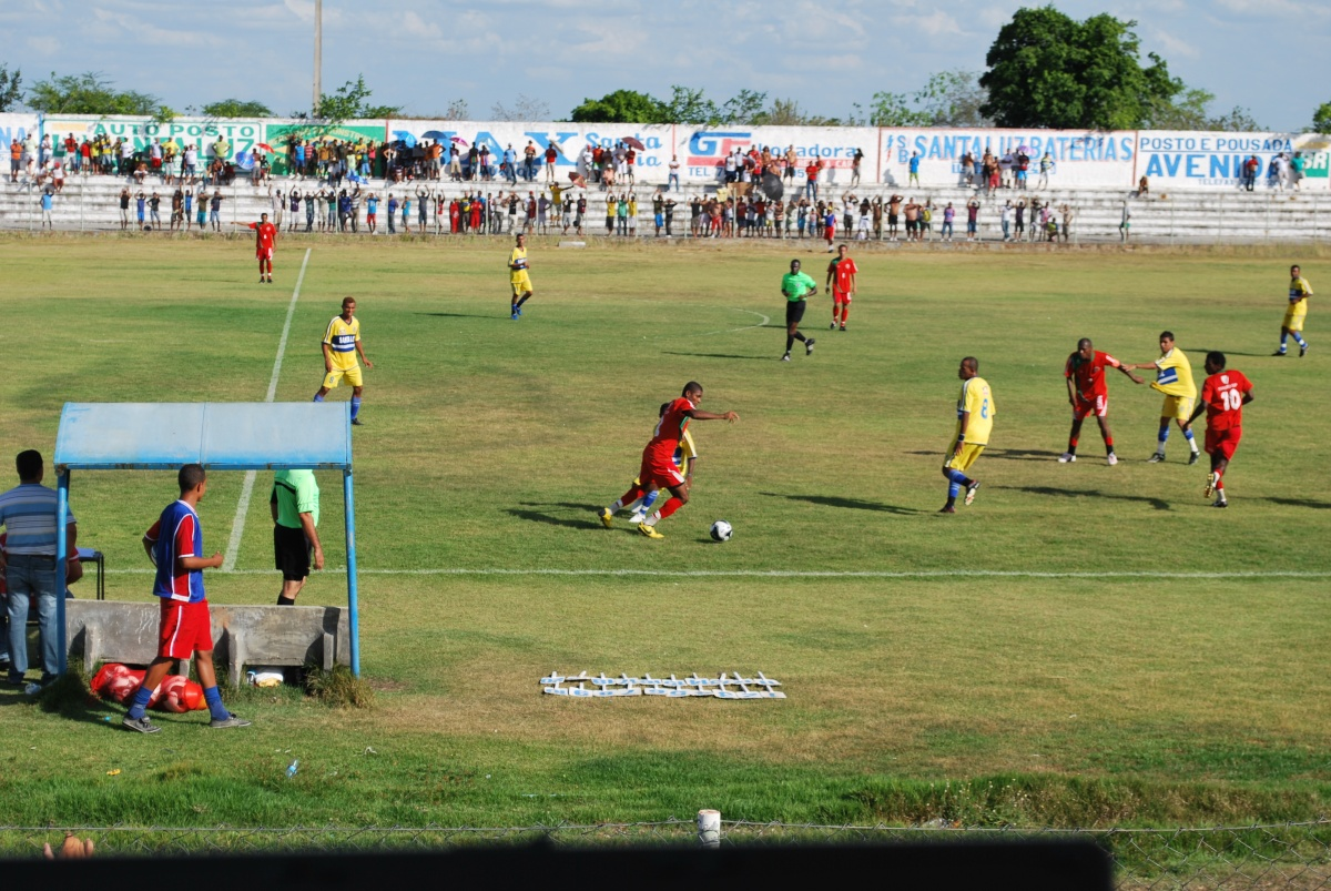 Fotos do jogo Santaluz 0 x 1 Porto Seguro, em Santa Luz-BA, 05 de dezembro de 2010. Fotos: João Garcia/Rádio Santa Luz FM.